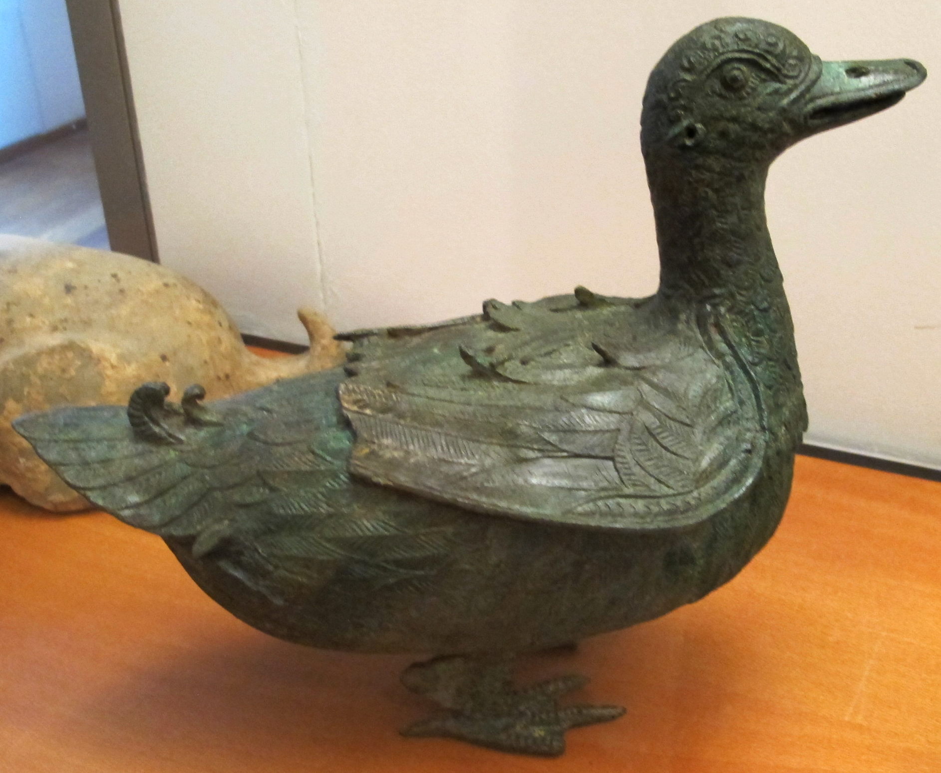 Dinastia han posteriore, bruciaprofumi a forma di anatra, II-III sec